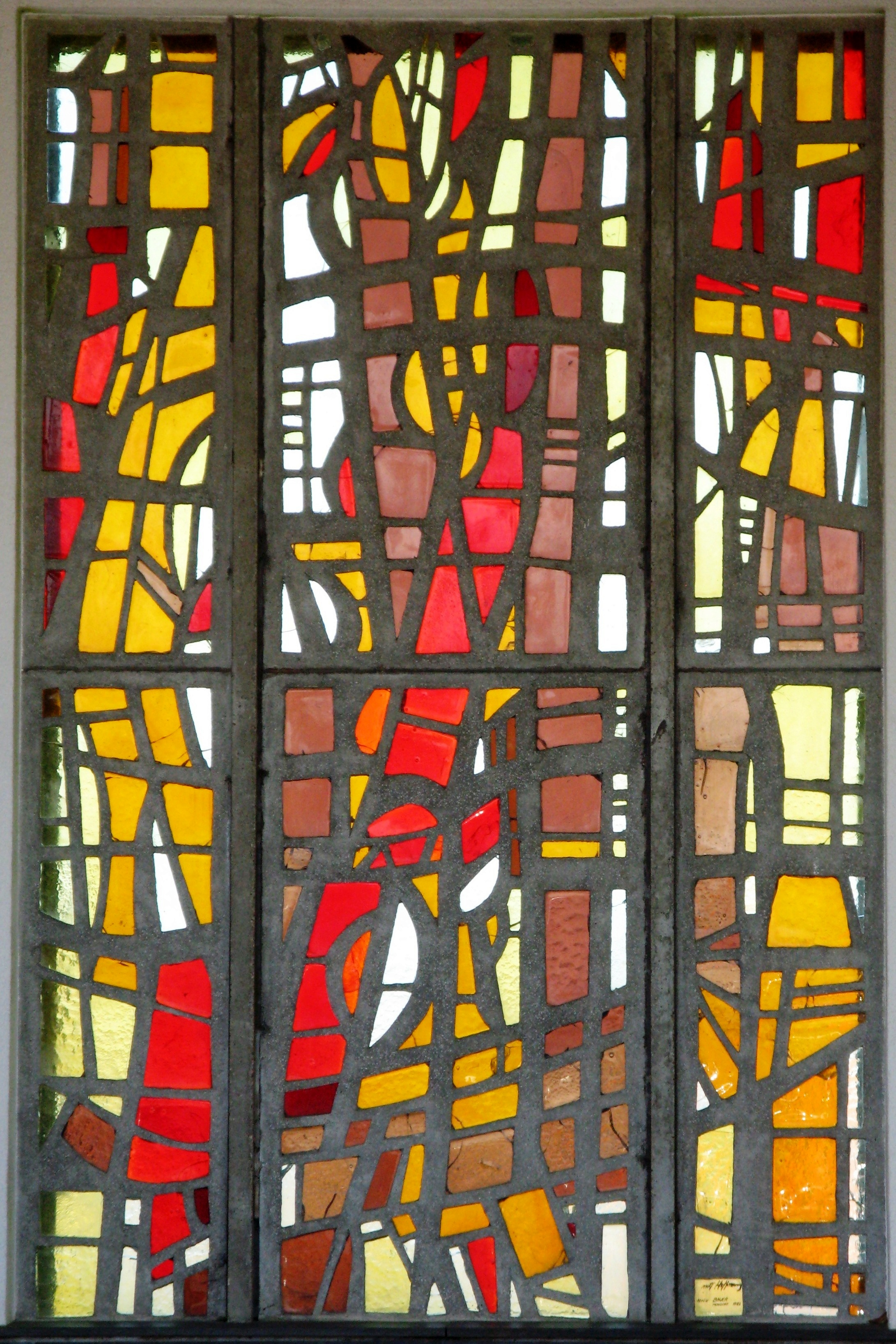 Gréiwels:Fënster am Kolumbarium Kategorie:Uertschaften zu Lëtzebuerg Kategorie:Gemeng Groussbus